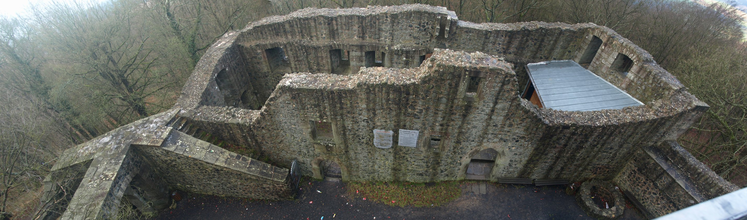 Panorama von Pallas und Küchentrakt, vom Bergfried aus fotografiert.